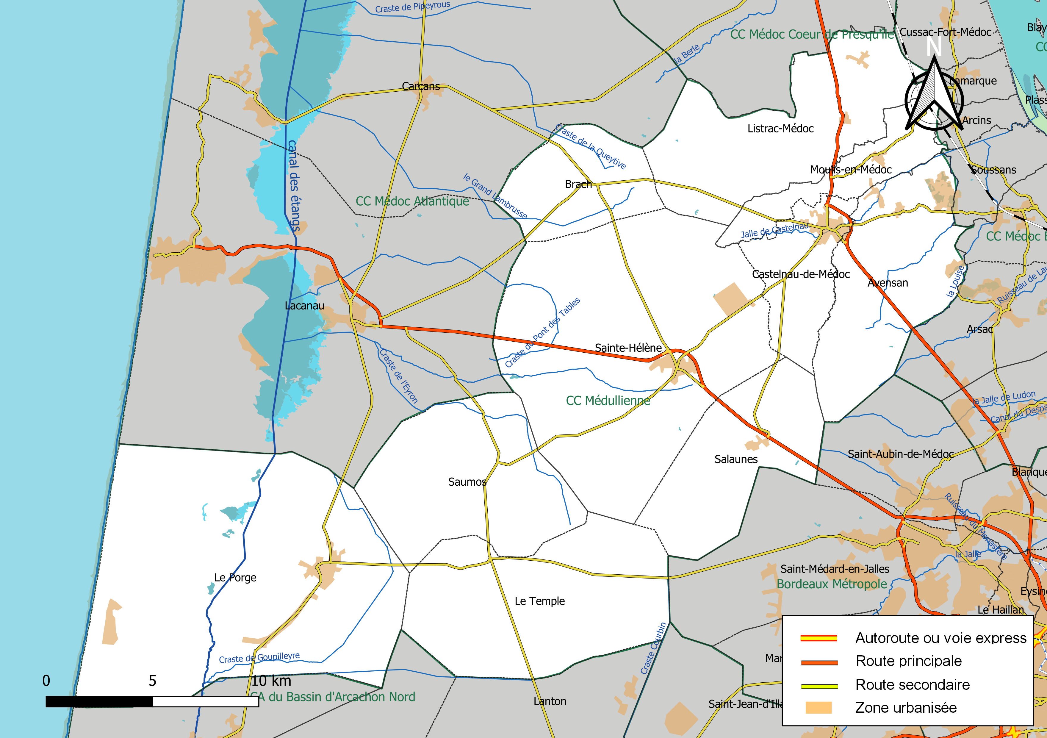 Carte géographique de la Communauté de communes Médullienne, département de la Gironde, France. Composition au 1er janvier 2019.